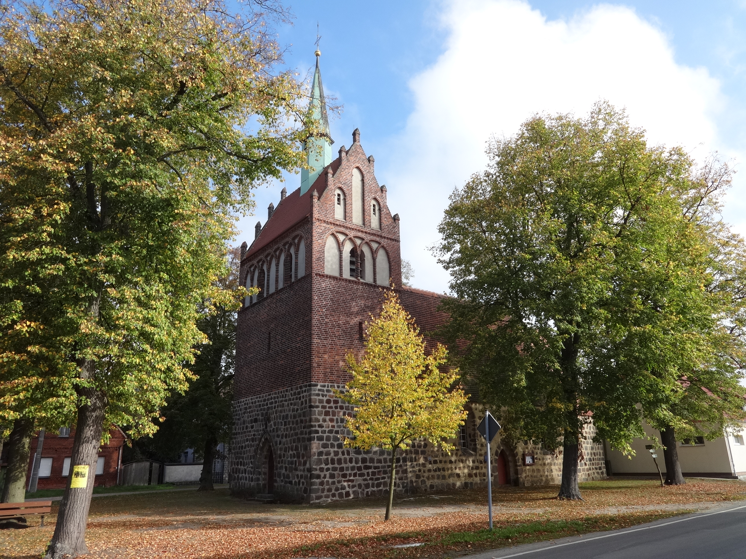 Kirche in Heideland-Eichholz im südbrandenburgischen Landkreis Elbe-Elster